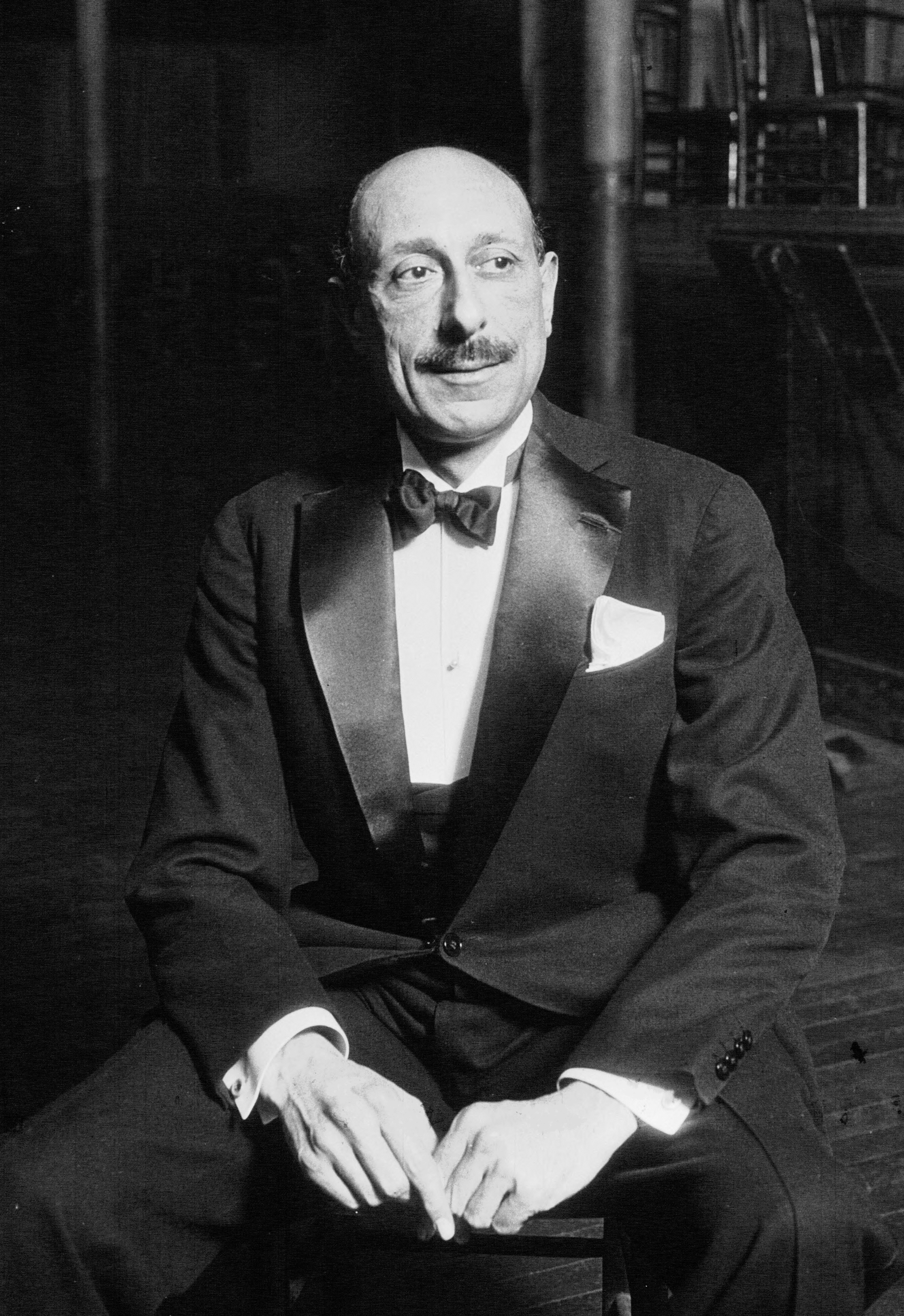 Salle Wagram : Ducret, champion olympique d'épée (portrait).